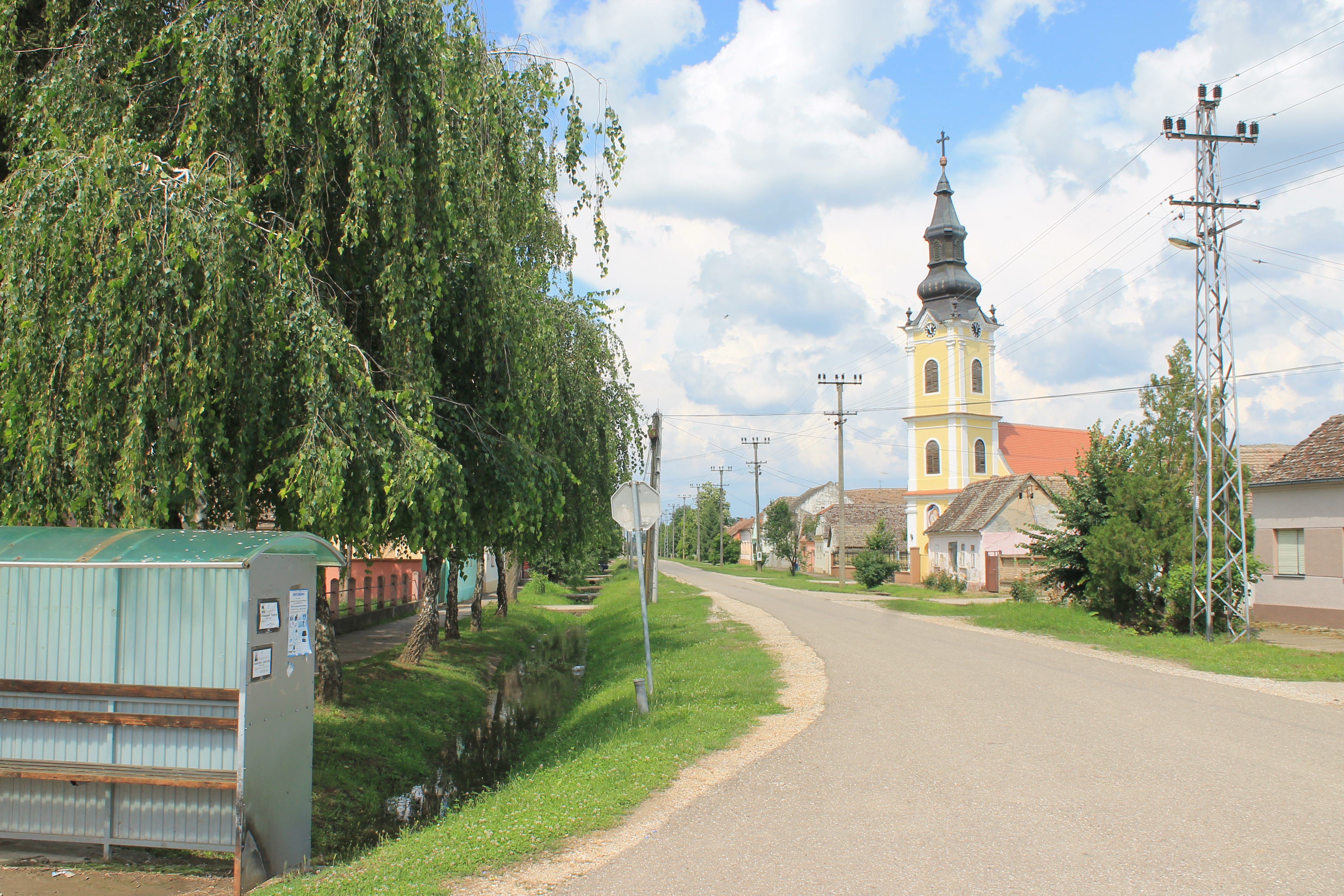 Ilinci